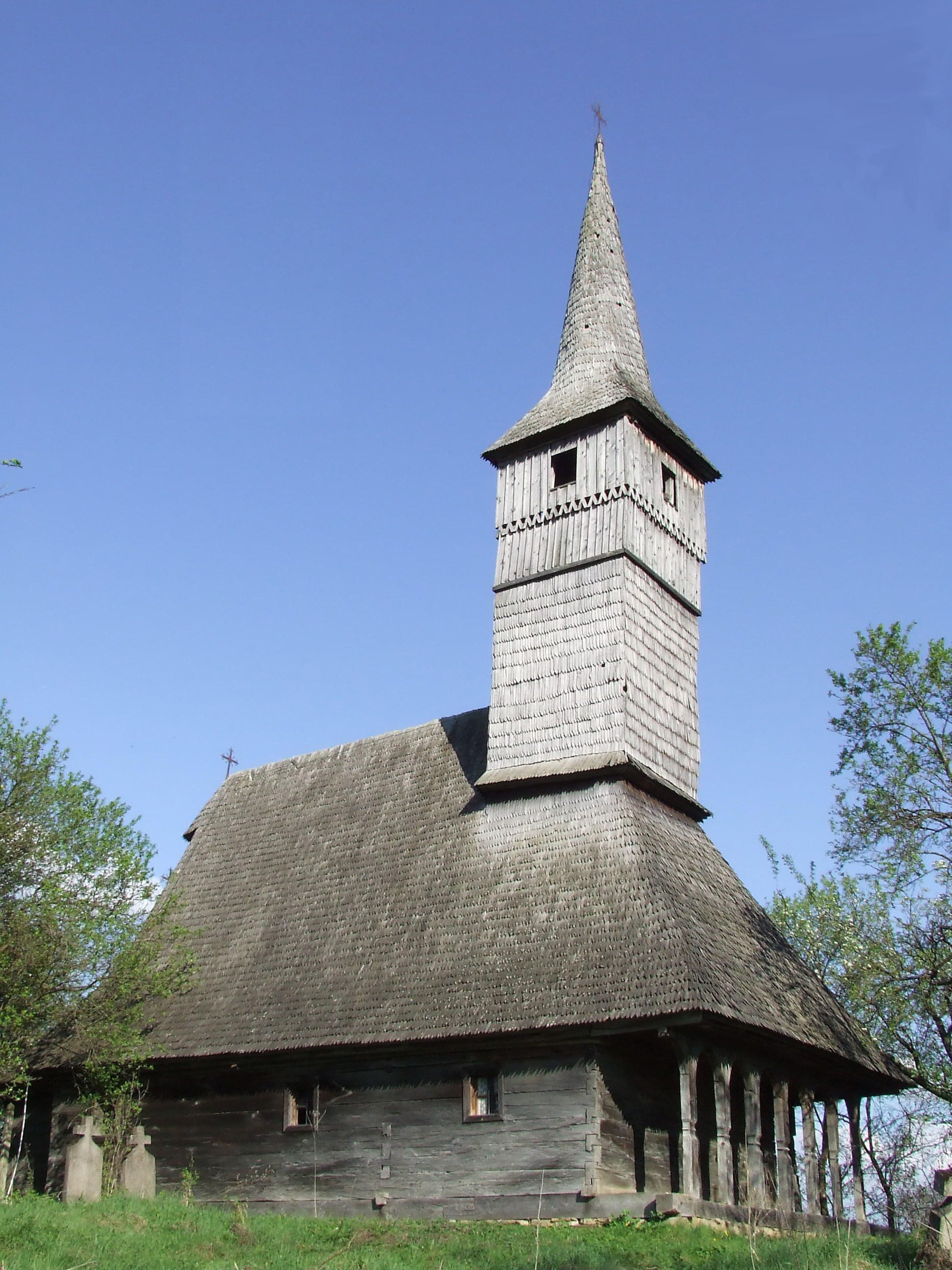 Biserica de lemn din Noţig, judeţul Sălaj. Vedere nord-vestică.